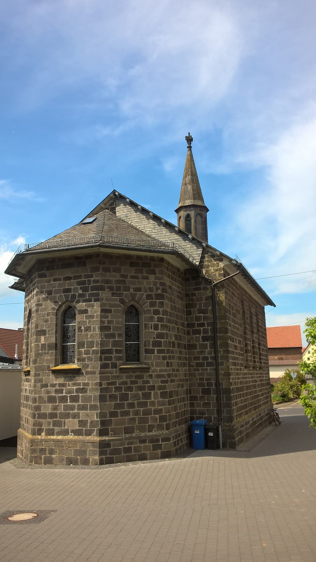 Evangelische Kirche Weitershain, Grünberg, Landkreis Gießen, Hessen, Deutschland